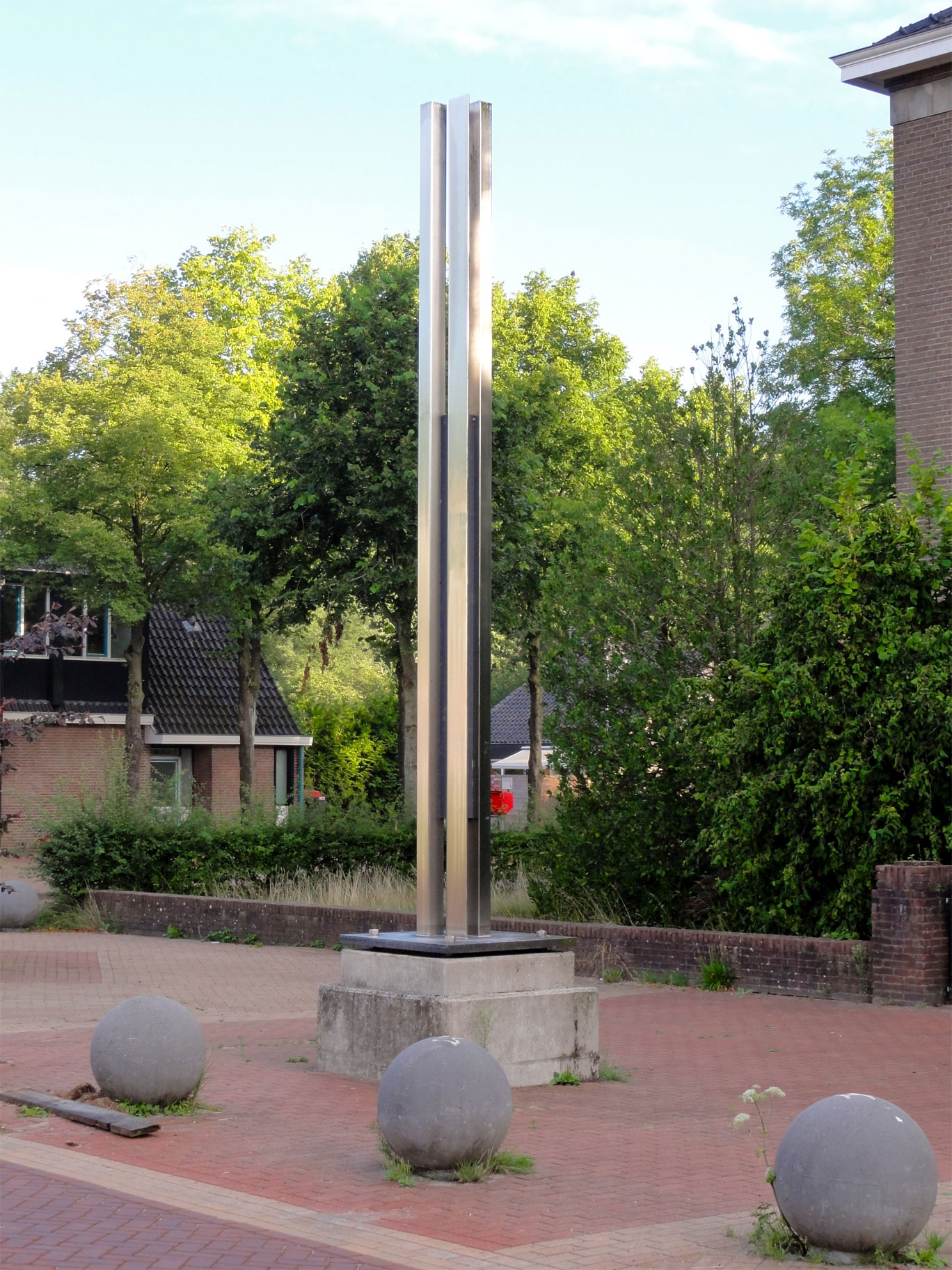 Sculpture van Jan Loman bij het gerechtsgebouw te Beetsterzwaag